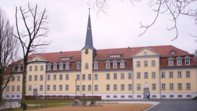 Hauptgebäude der Salzmannschule